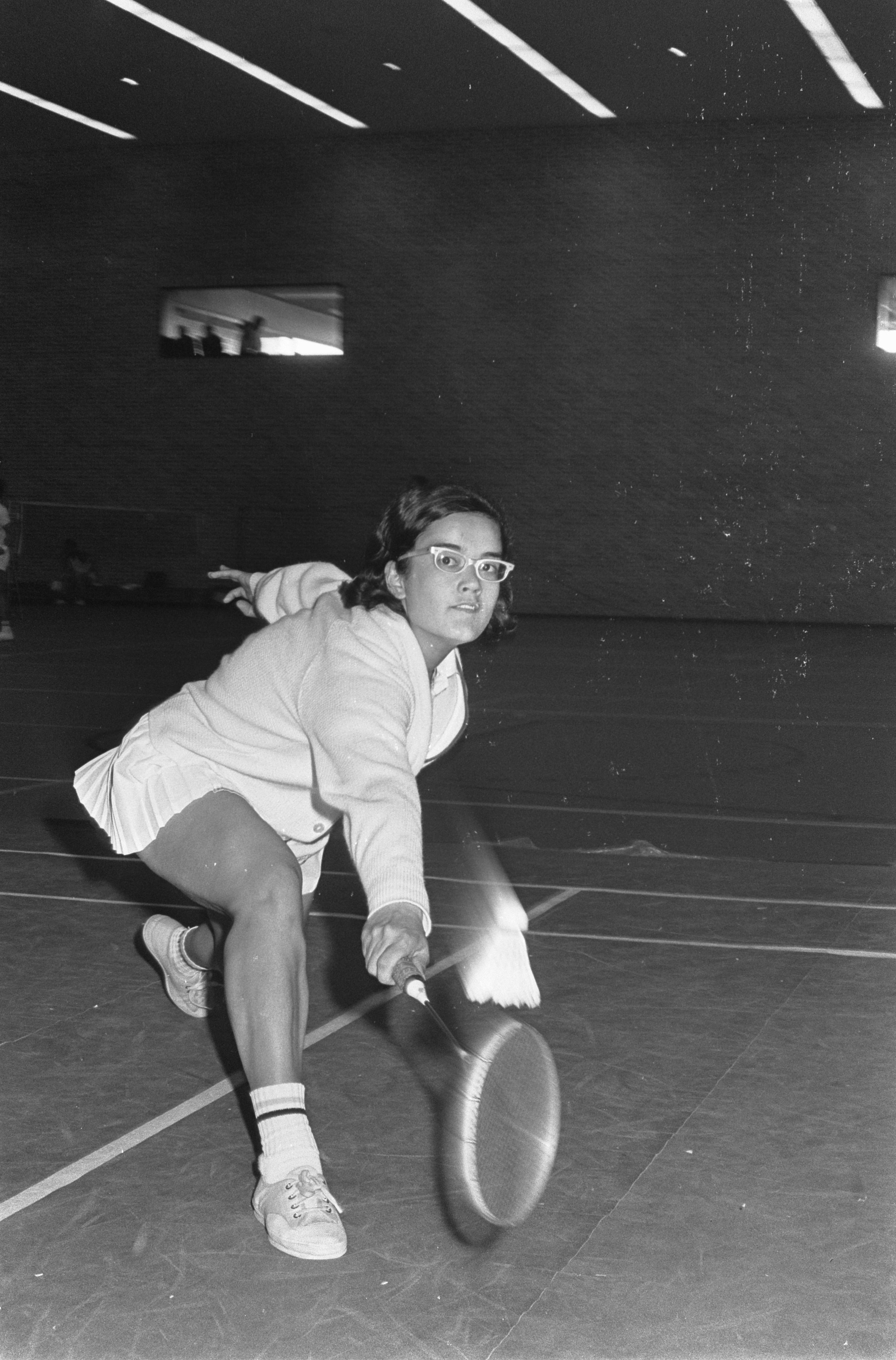 Collectie / Archief : Fotocollectie Anefo Reportage / Serie : [ onbekend ] Beschrijving : Lilly ter Metz in aktie badminton Datum : 2 april 1968 Trefwoorden : BADMINTON Fotograaf : Kroon, Ron / Anefo Auteursrechthebbende : Nationaal Archief Materiaalsoort : Negatief (zwart/wit) Nummer archiefinventaris : bekijk toegang 2.24.01.05 Bestanddeelnummer : 921-2198